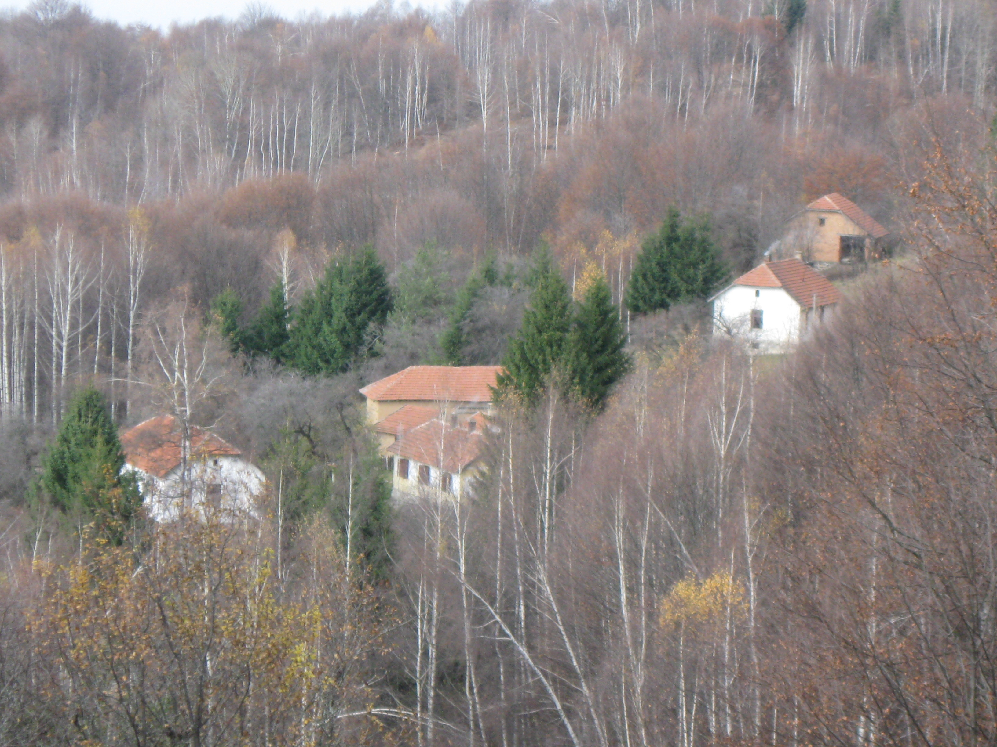 Mlačište - Deo zaseoka Miljkovci